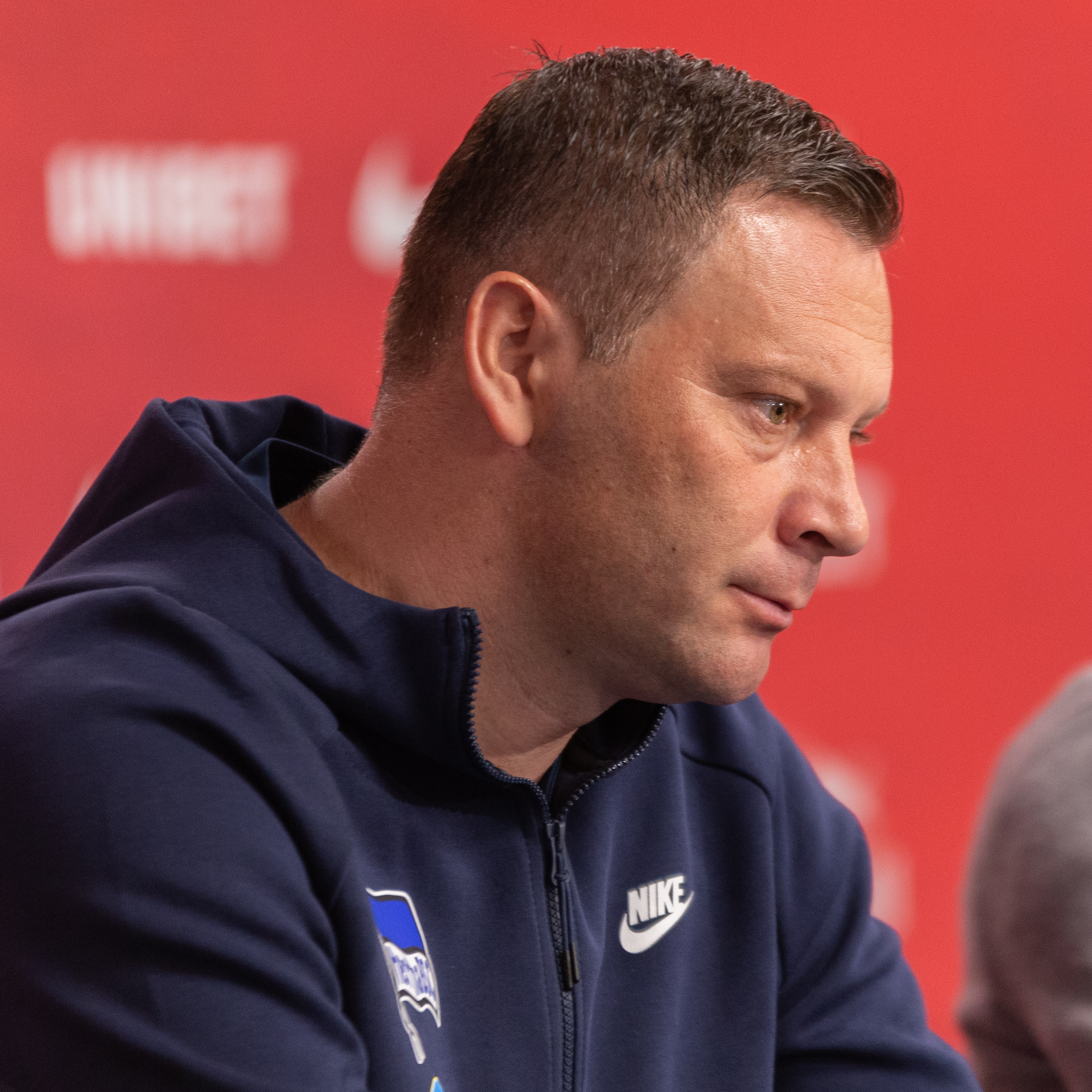 Fußball, Männer, 1. Bundesliga, RB Leipzig - Hertha BSC; Pal Dardai (Hertha BSC, Trainer, head coach); Porträt, Einzelbild